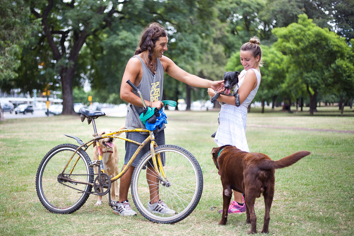 Bicis, rollers y skate en Palermo